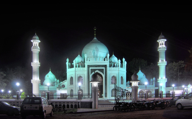 കരുനാഗപ്പള്ളി‍മുസ്ലീം‍പള്ളി